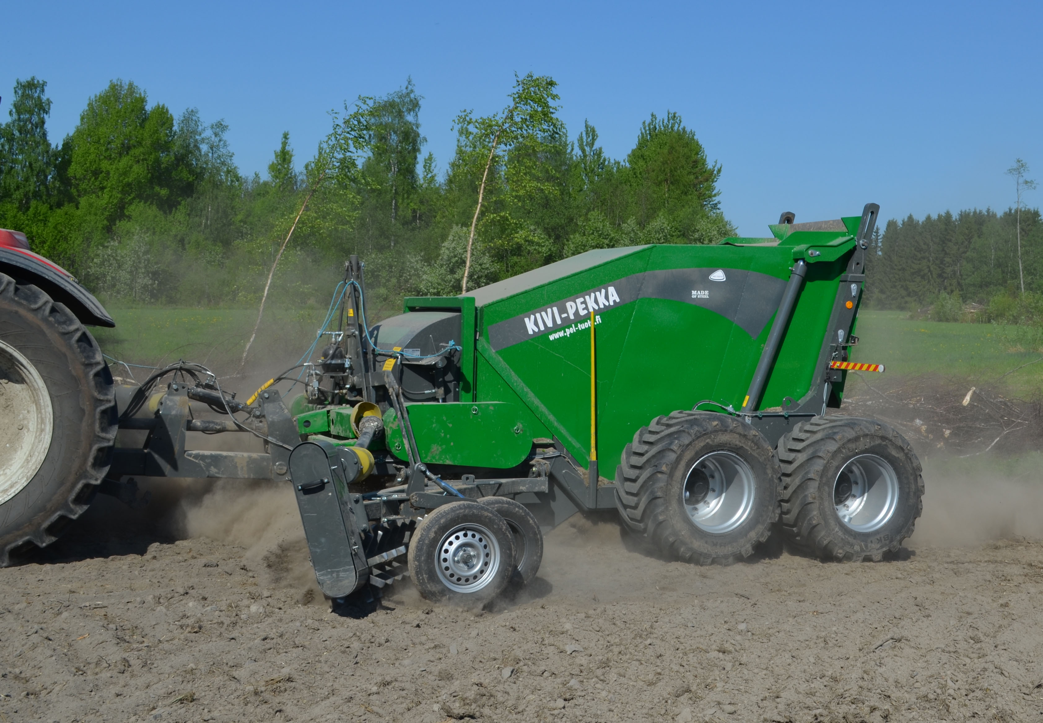 Traktorivetoinen kivenkeräyskone työskentelee pellolla.